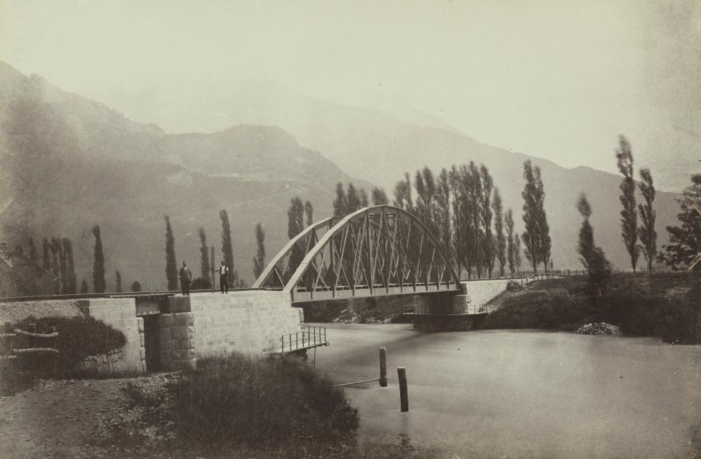 Obere Linthbrücke mit Tunnel